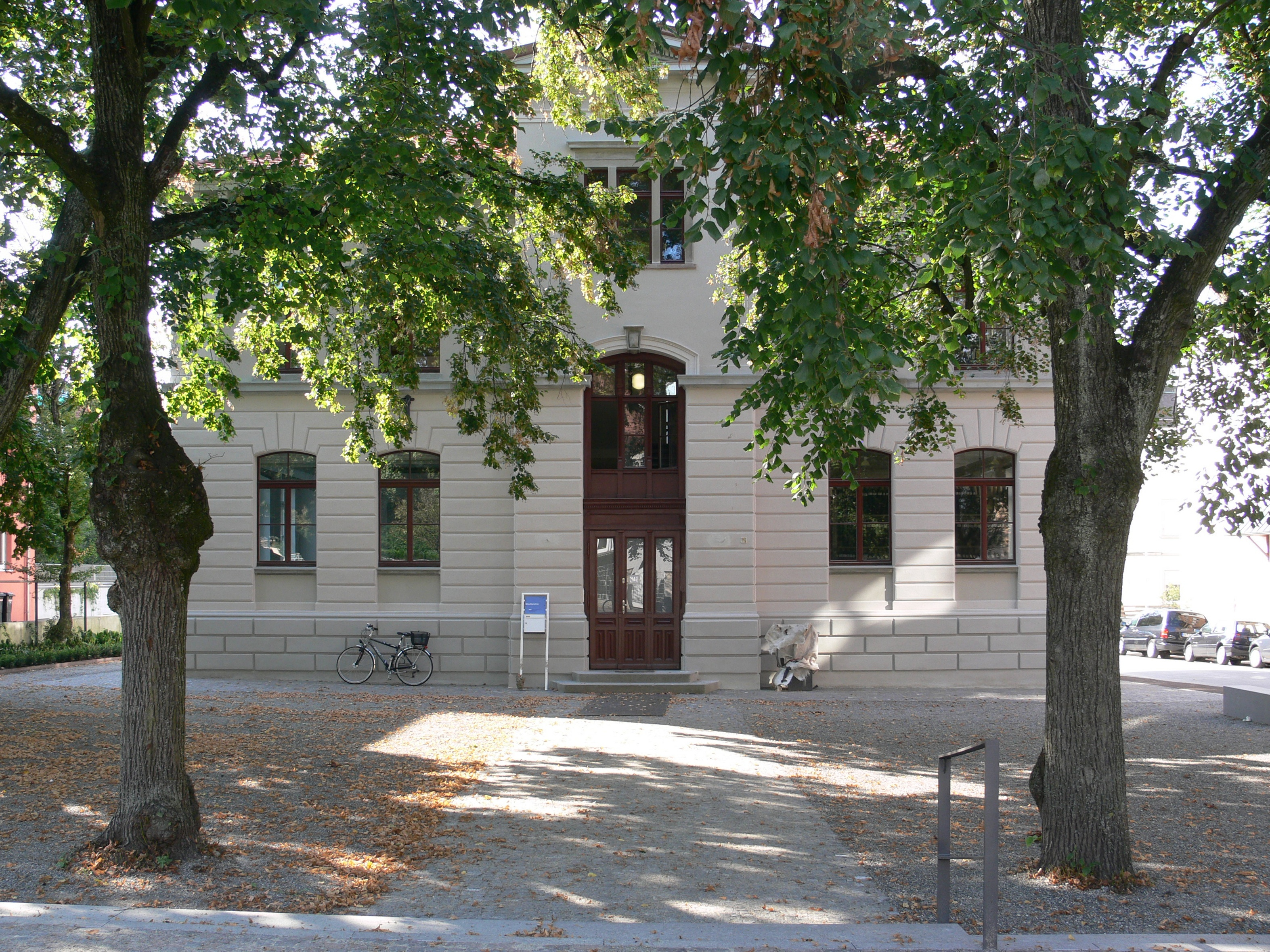 Ravensburg, Kuppelnaustraße, Stadtarchiv (früher Mädchenrealschule, genannt „Affenkasten“)